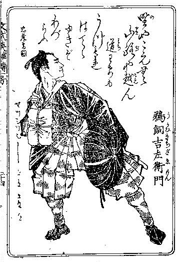 鵜飼吉左衛門